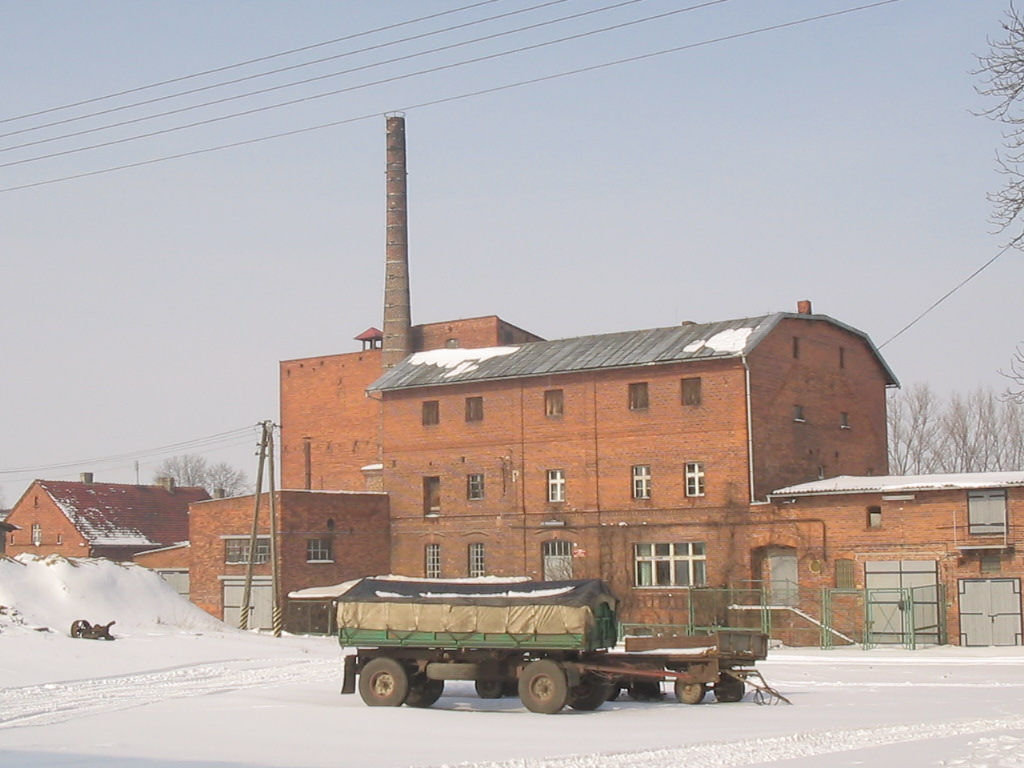 Pszeniczna - gorzelnia z płatkarnią (nr 1), 2 poł. XIX, obecnie nieczynna